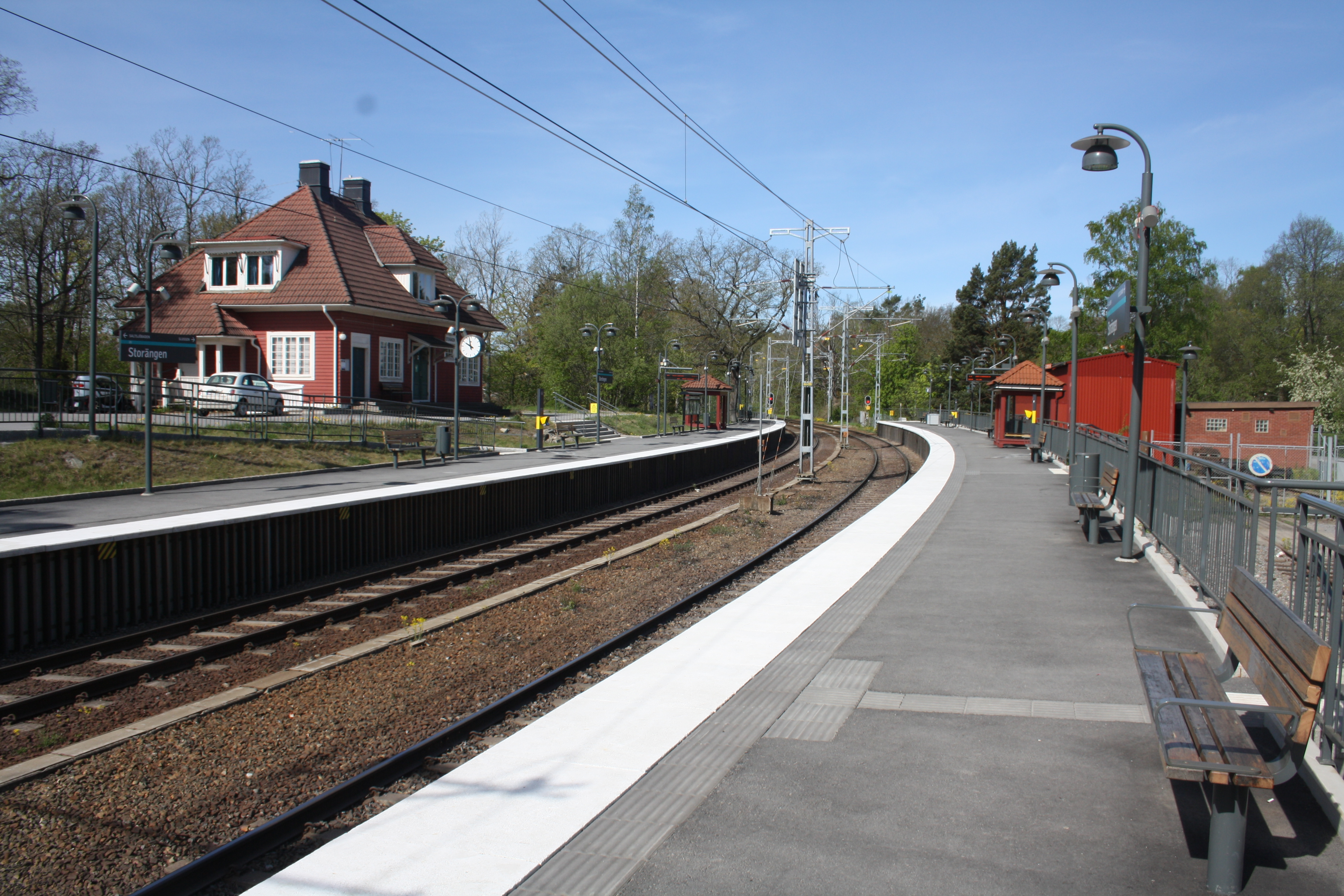 Storängen station